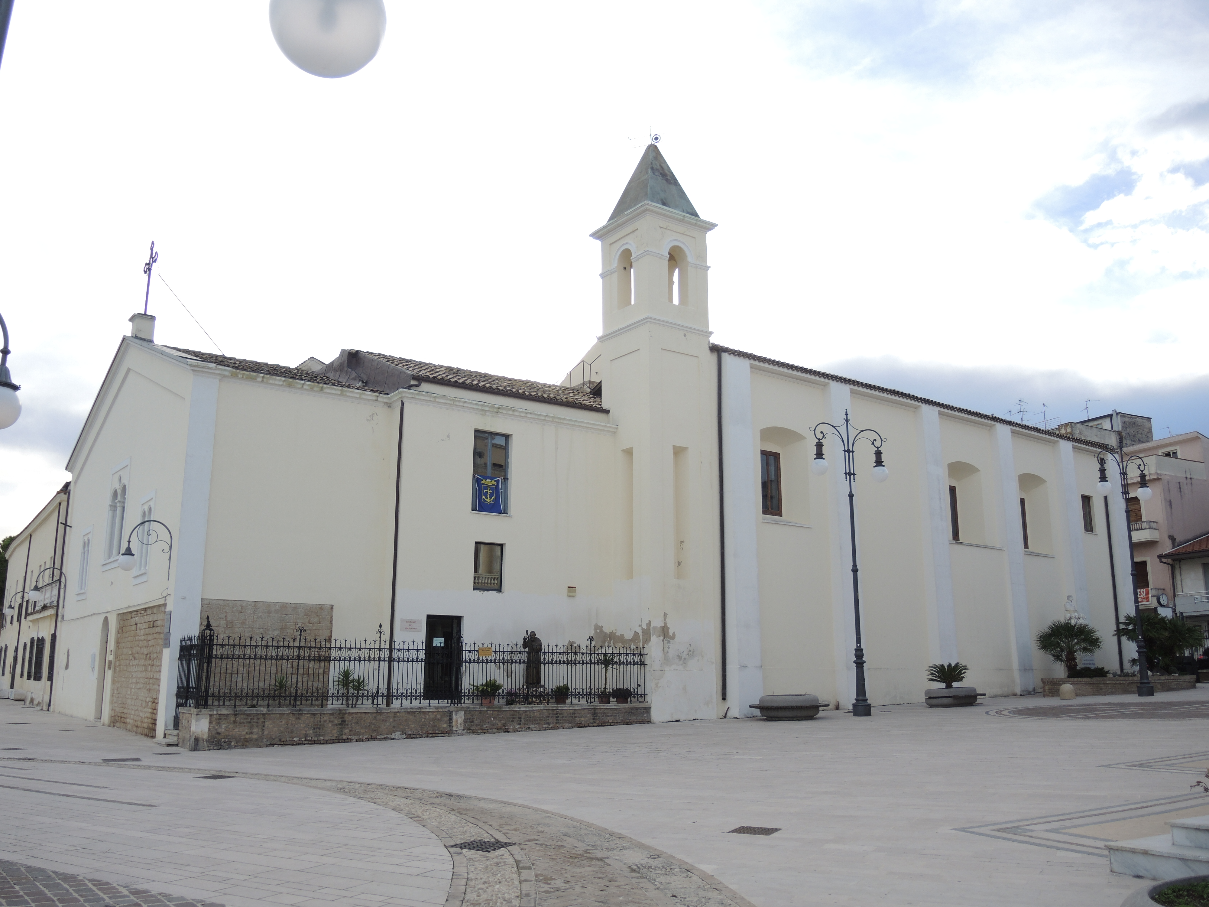 Ortona: Chiesa di Santa Caterina d'Alessandria